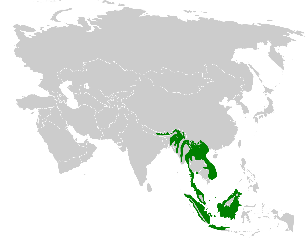 Abroscopus superciliaris distribution map, based on